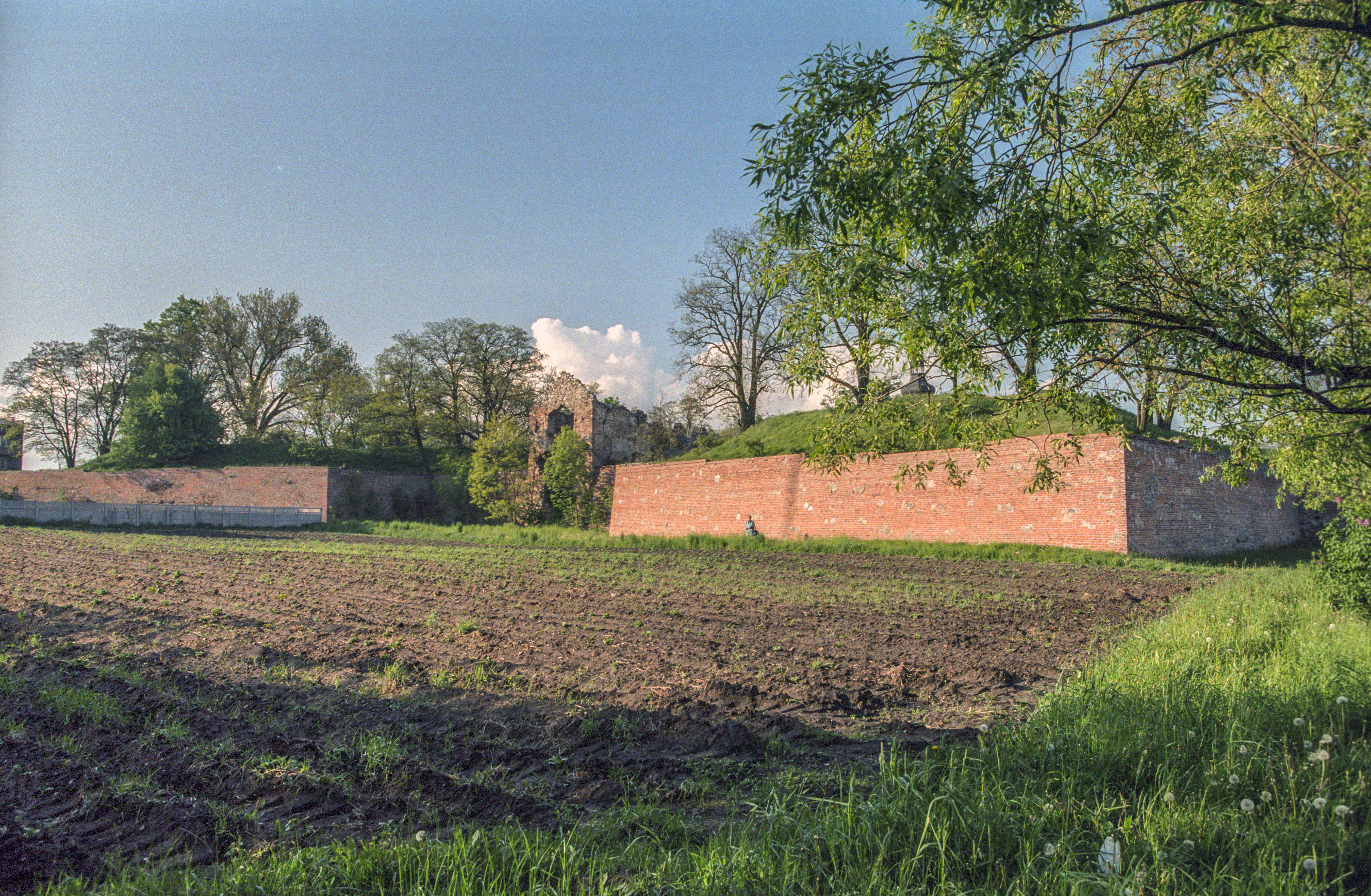 Danków, fortyfikacje bastionowe